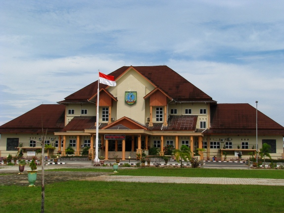 Les bureaux du camat (chef de district) de Manggar dans le kabupaten de Belitung oriental en Indonésie.